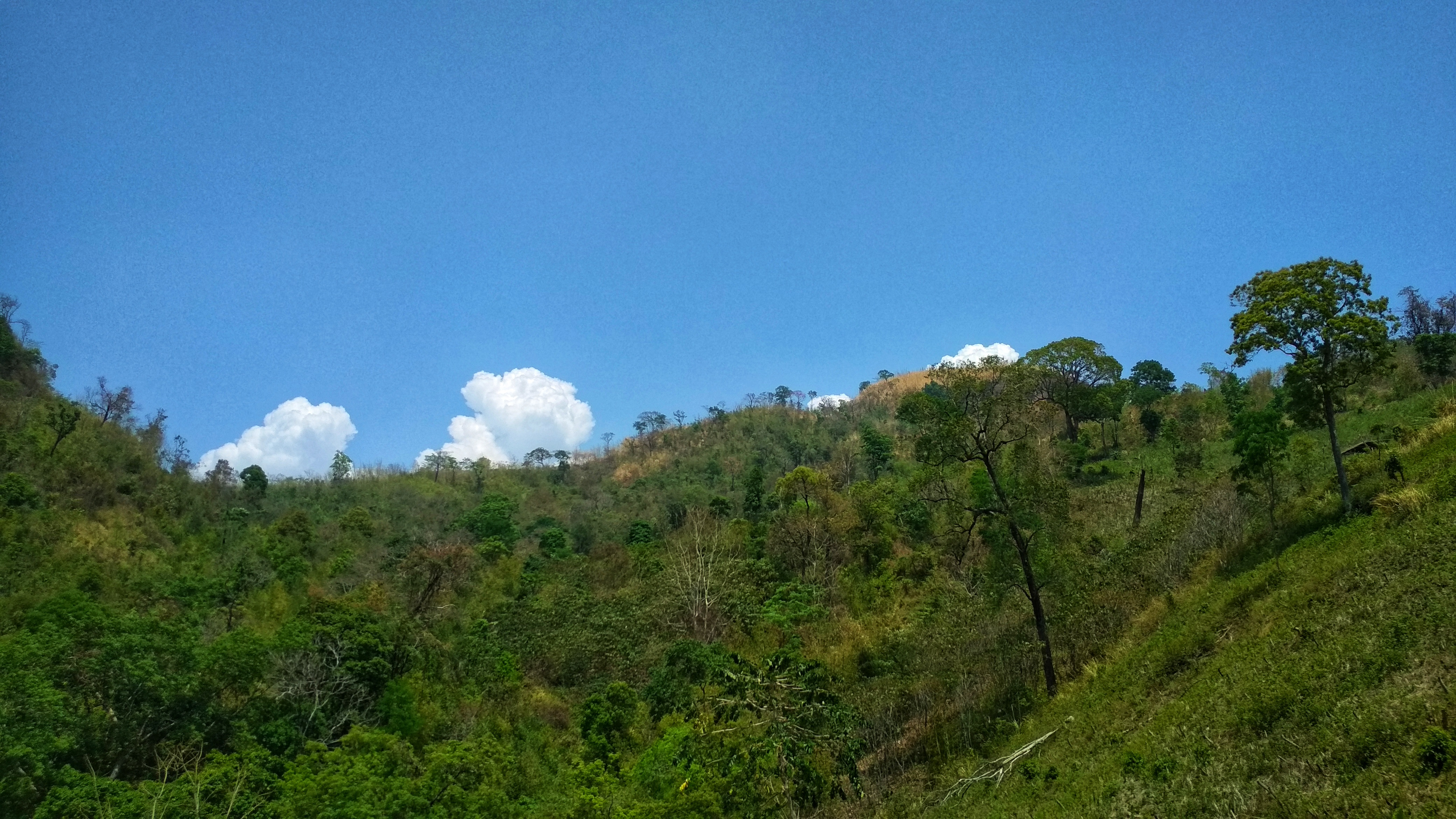 সাঙ্গু বন্যপ্রাণ অভয়ারণ্য